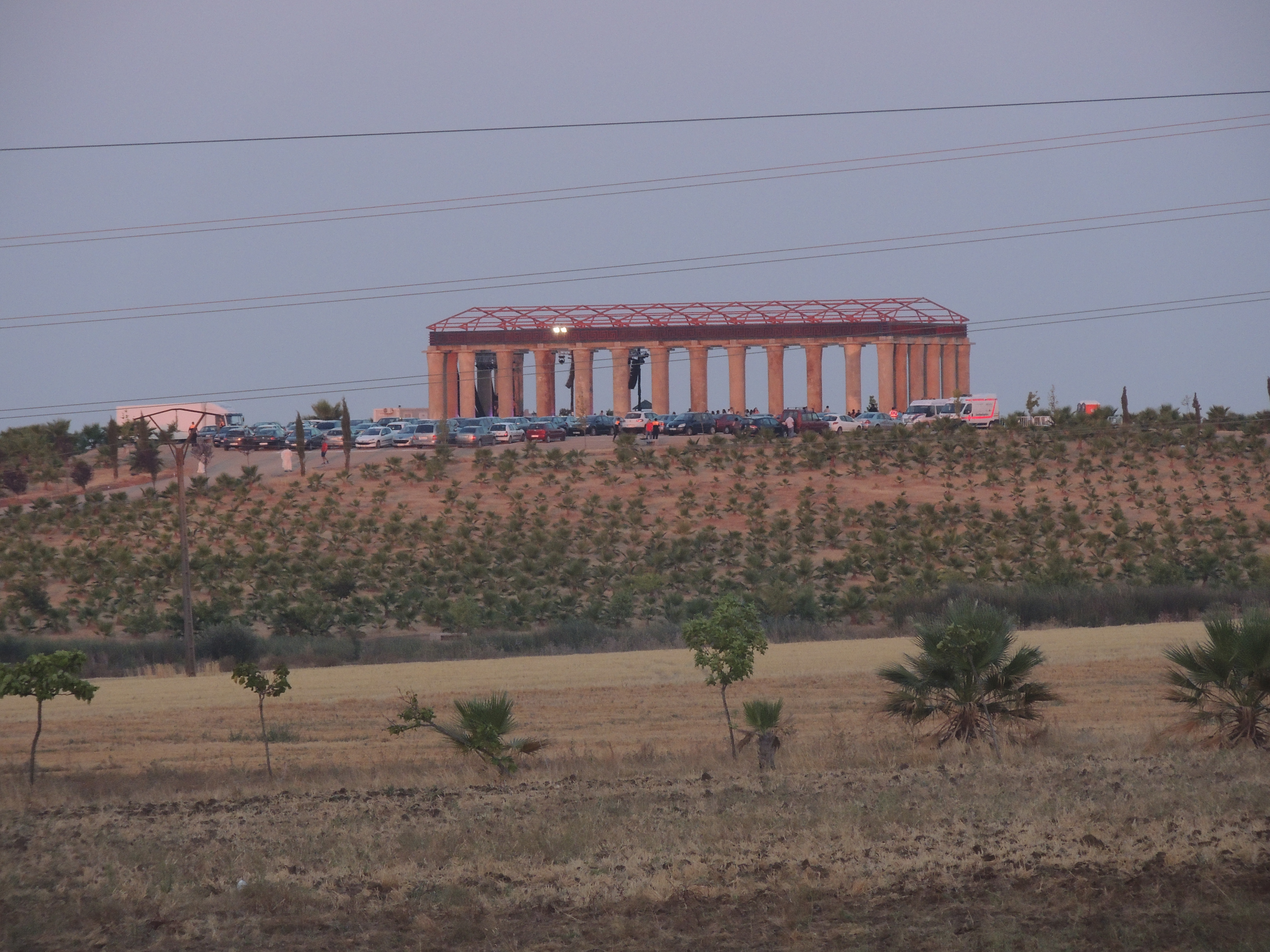 Parque Municipal El Palmeral